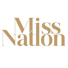 Лого на конкурса за красота „Miss Nation”.